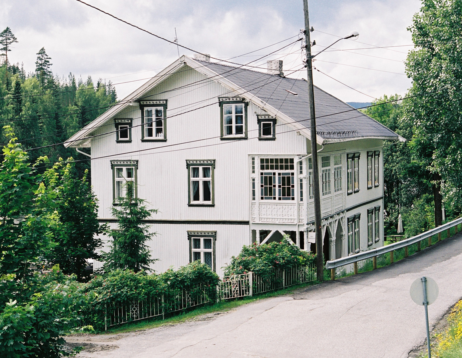 Hen jernbanehotell, bygd 1882.